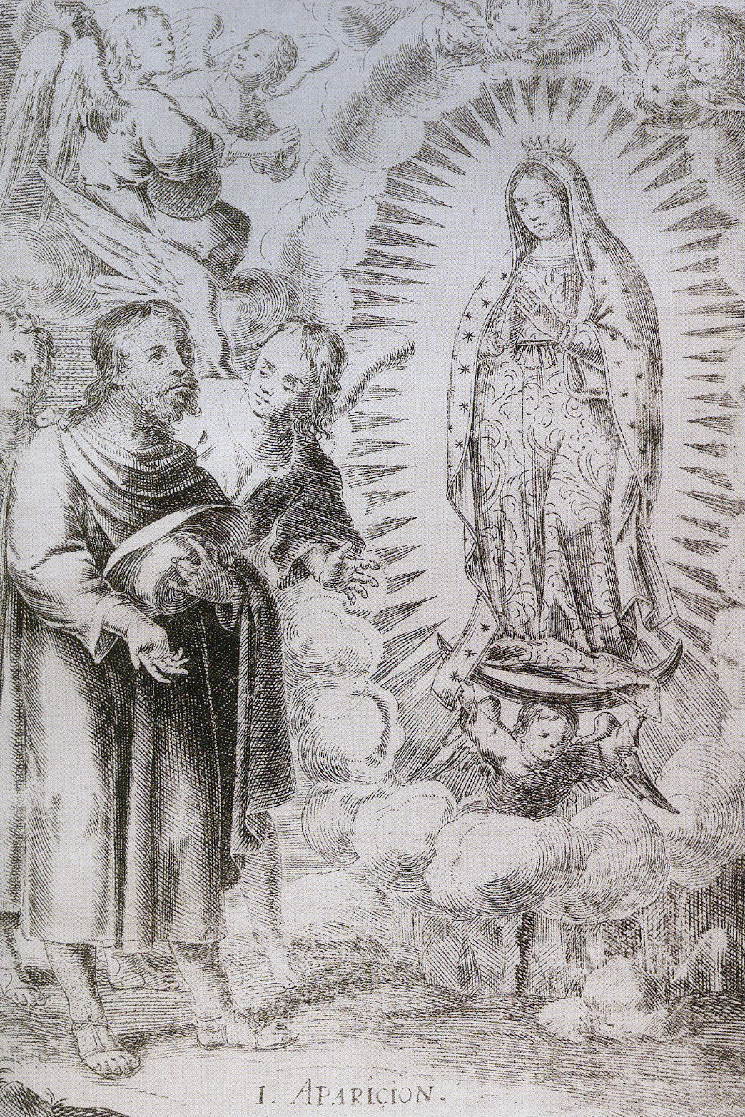 Gravure publiée dans l'ouvrage "Felicidad de México" en 1666 et 1669 (Espagne) représentant Juan Diego lors de l'apparition de la Vierge de Guadalupe